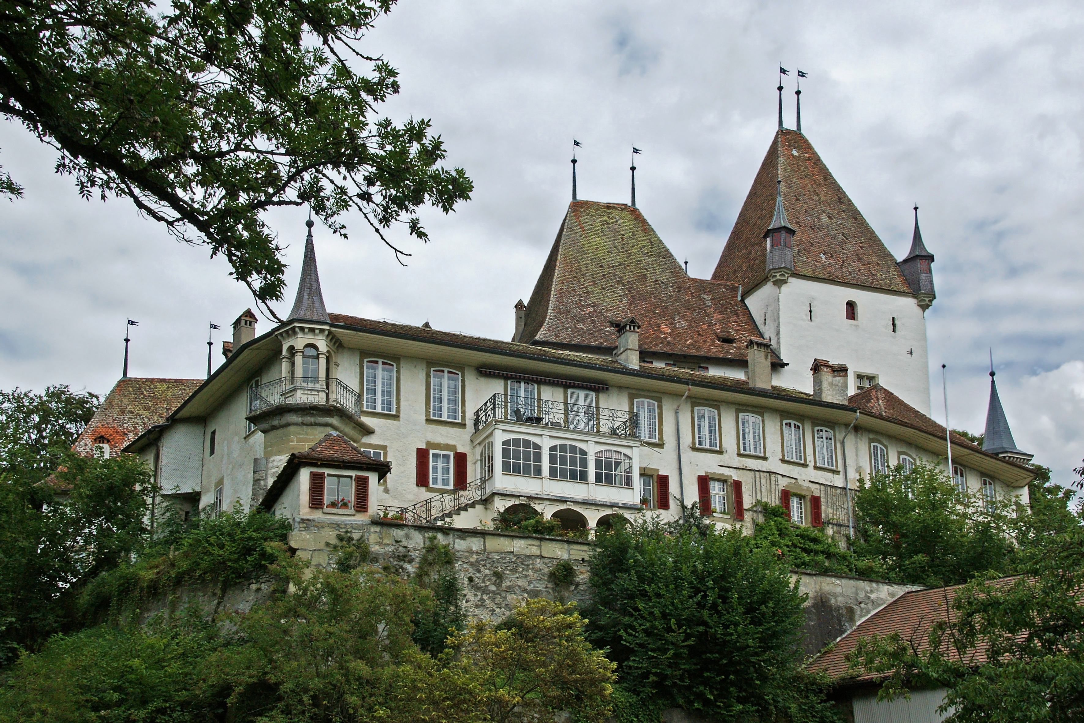 Schloss Worb im Kanton Bern